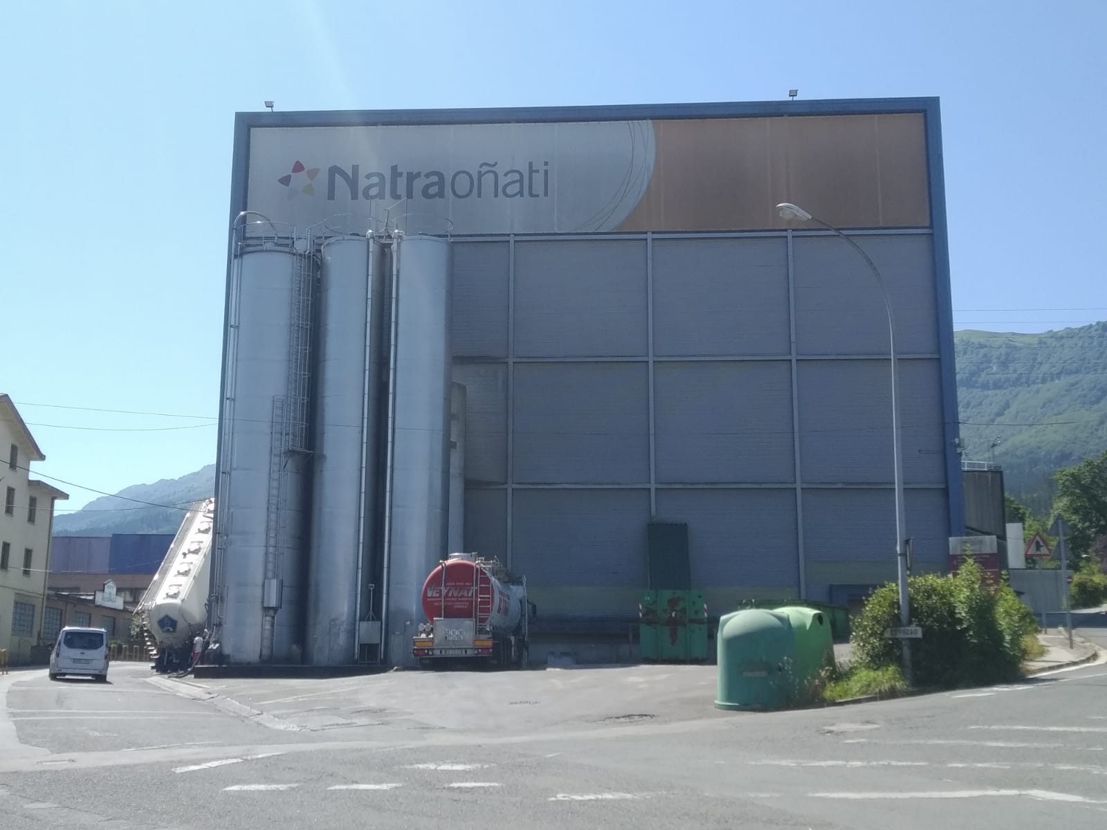 Oñatiko txokolate fabrika, Natra Oñati.